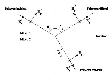 angles de Fresnel